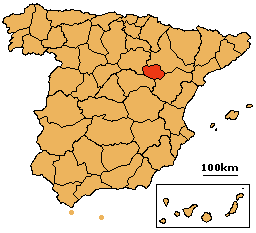 Modificación del mapa "Map_Spain_1822_.png" con colores iguales para todas las provincias y provincia de Calatayud resaltada.